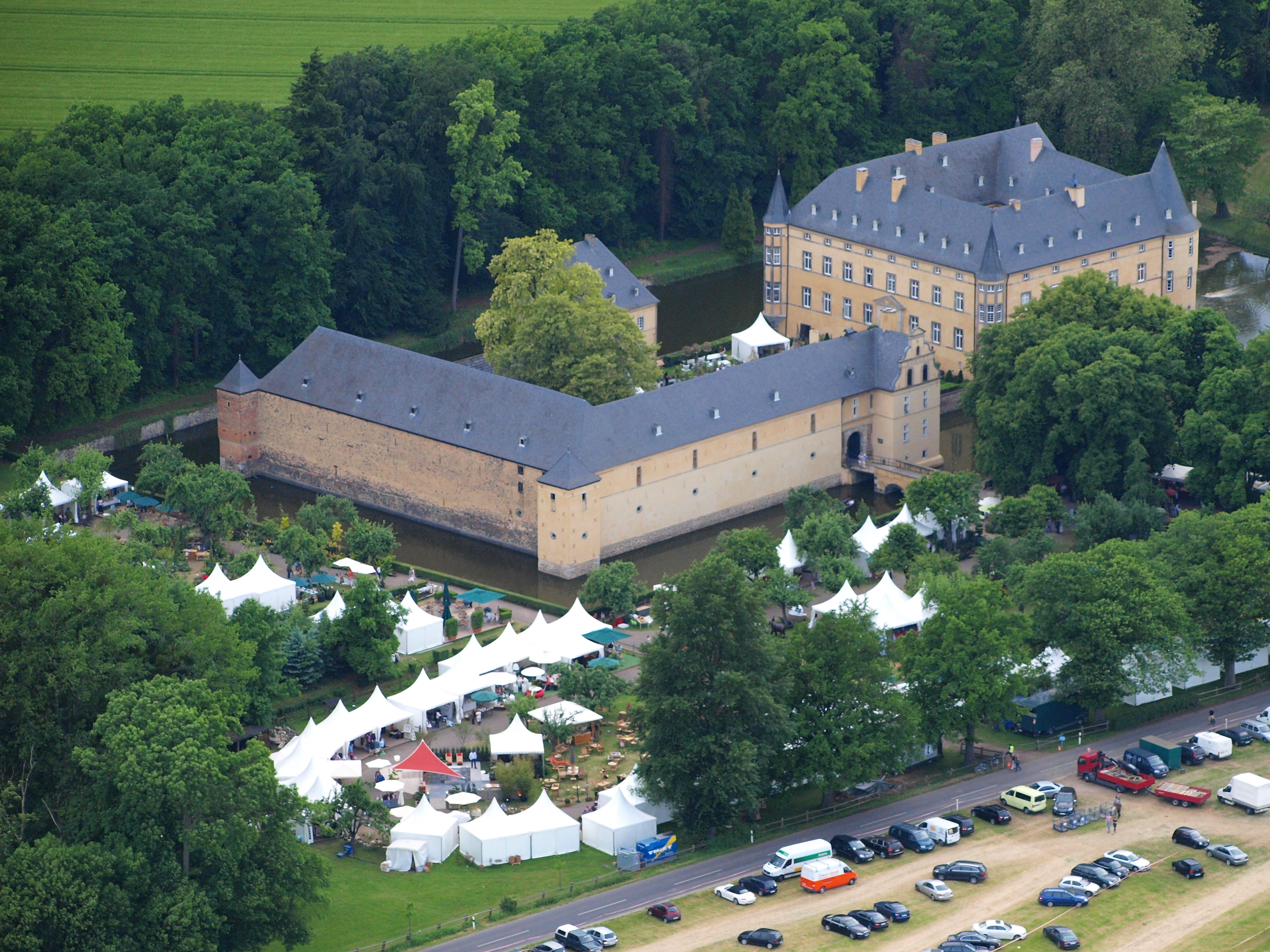 Burg Adendorf während der Messe Landpartie, die jährlich am Himmelfahrtstag stattfindet.